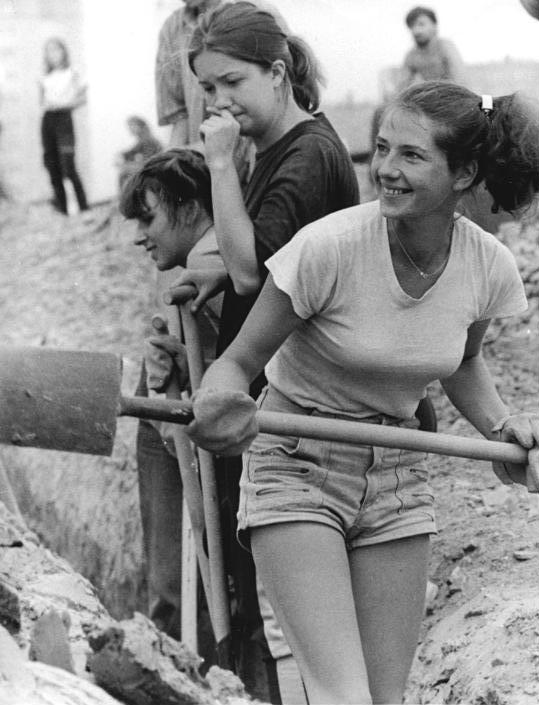 Berlin, Studentenbrigade, Gaststudenten ADN-ZB Uhlemann 22.7.86 Berlin: Studentensommer - 60 polnische und 20 DDR-Studenten arbeiten gegenwärtig im Studentensommer an der Verlängerung der Straßenbahnlinie 18 und 12 nach Ahrensfelde. Die von ihnen ausgeschachteten ein Meter tiefen und 40 bis 80 Zentimeter breiten Gräben werden für die Kabelerdverlegung zur Elektrifizierung der Tatrabahn benötigt. Den Pädagogikstudenten aus Kielce macht die Arbeit Spaß. -Siehe auch Motiv 1986-0722-24 N